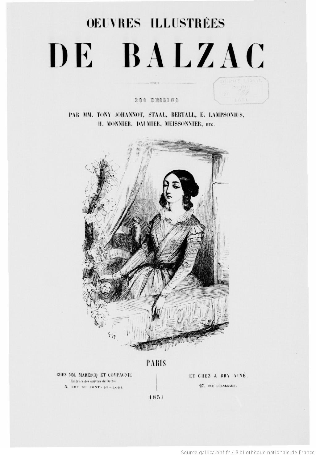 Couverture de l'édition illustrée de Balzac. Image provenant de Gallica